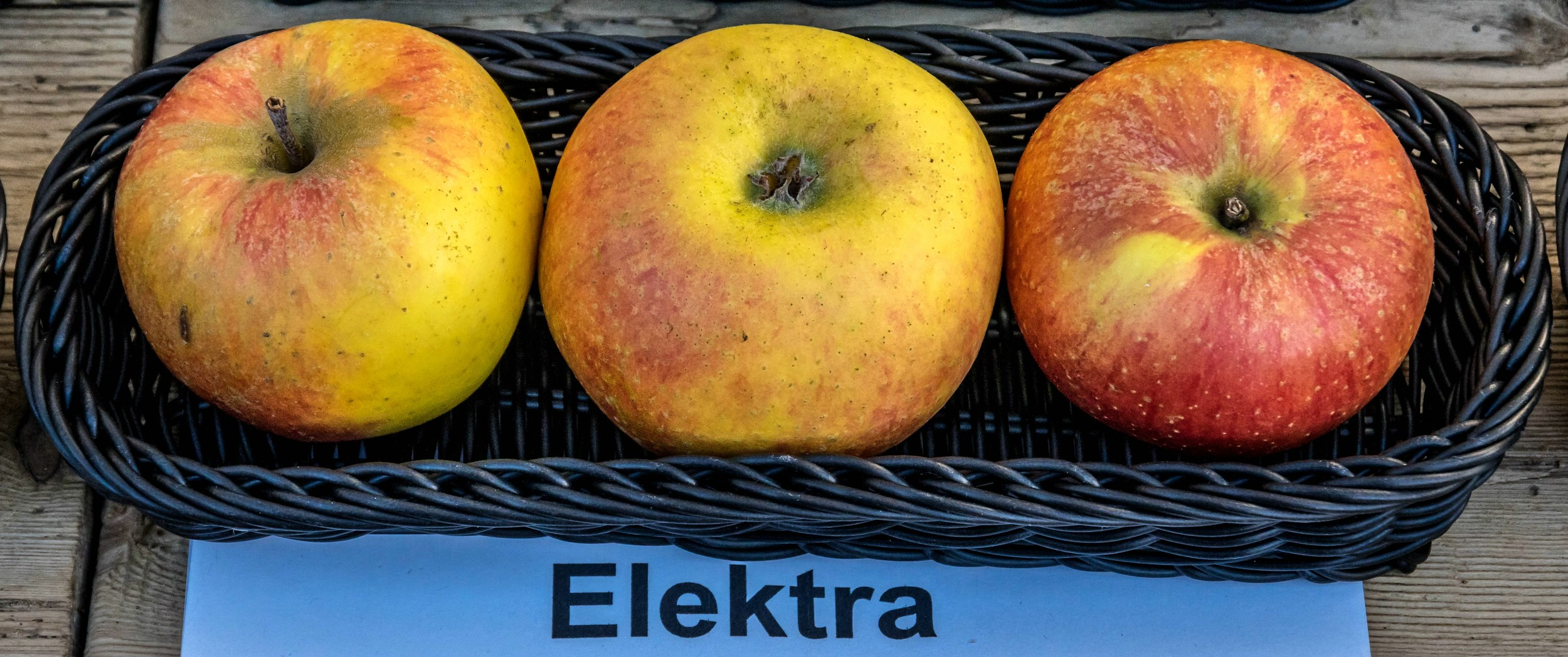 Alte Apfelsorten, von denen es im Badischen noch tragende Bäume gibt. Alle Aufnahmen au dem Oktober 2015